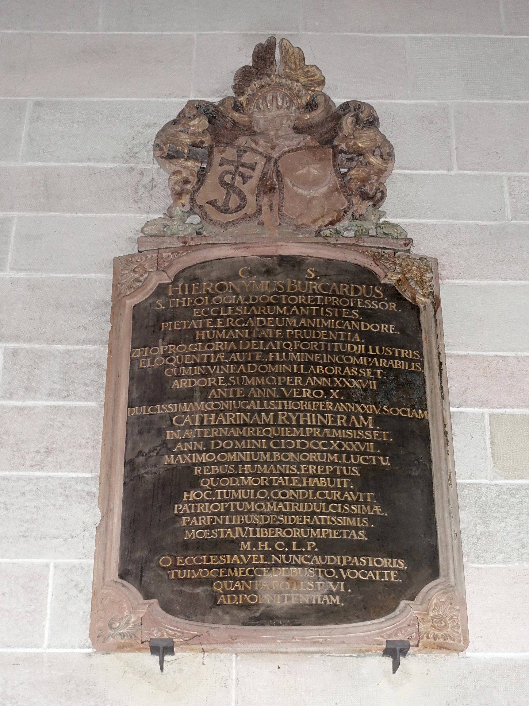 Hieronymus Burkardt (1680–1737) Antistes Basler Münster. Professor der Theologie. Epitaph im Basler Münster